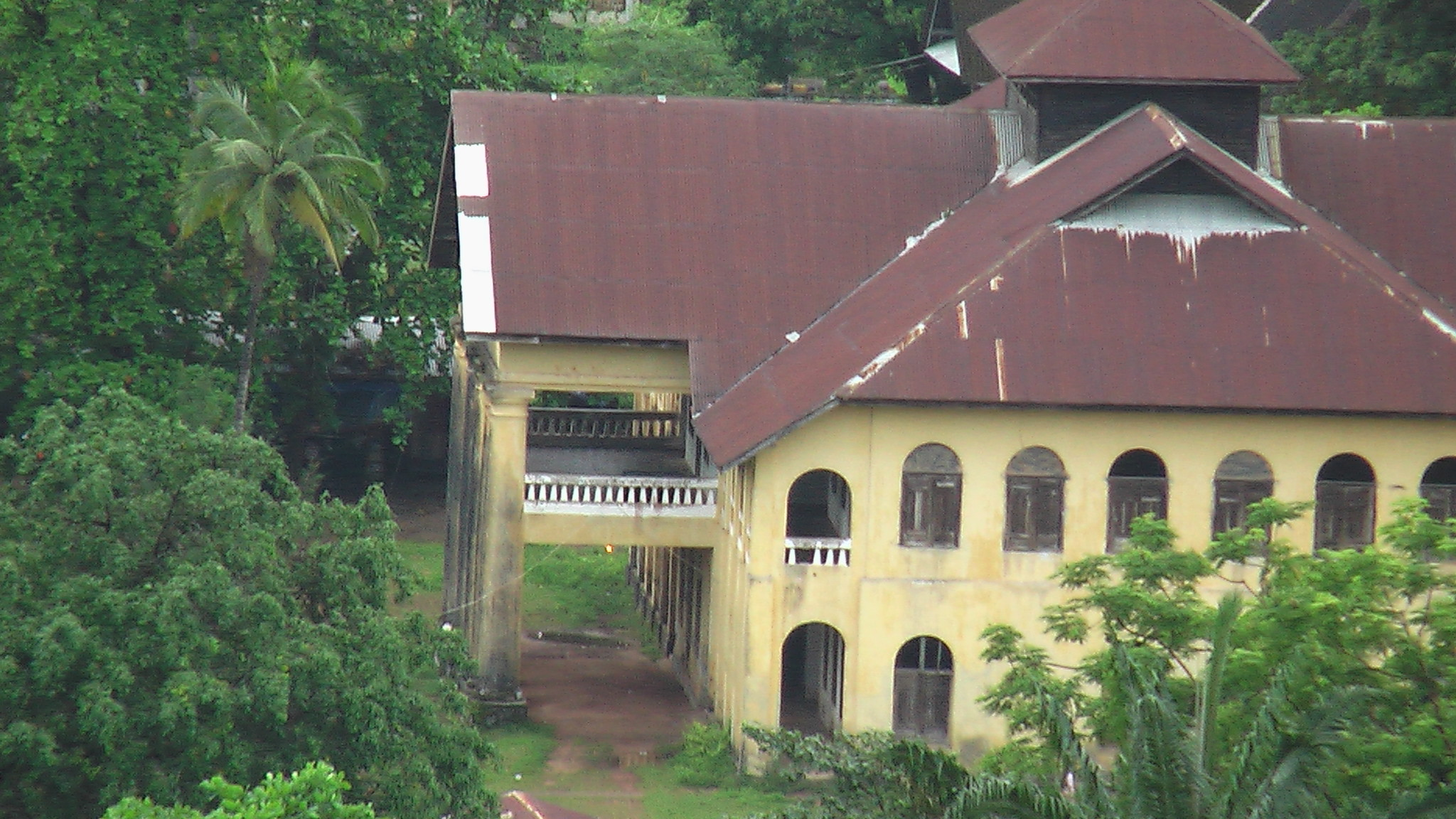 Mawlamyine MMR011001701, Myanmar (Burma)